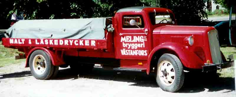 Volvo LV82 Truck 1939